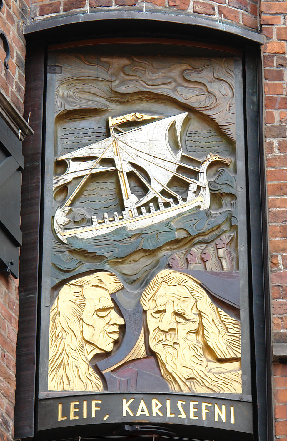 Ozean-Bezwinger auf 10 Bildtafeln)Das abgebildete Objekt ist ein geschütztes Kulturdenkmal in der Freien Hansestadt Bremen, mit der Nr. 1500,T001 beim Landesamt für Denkmalpflege registriert.